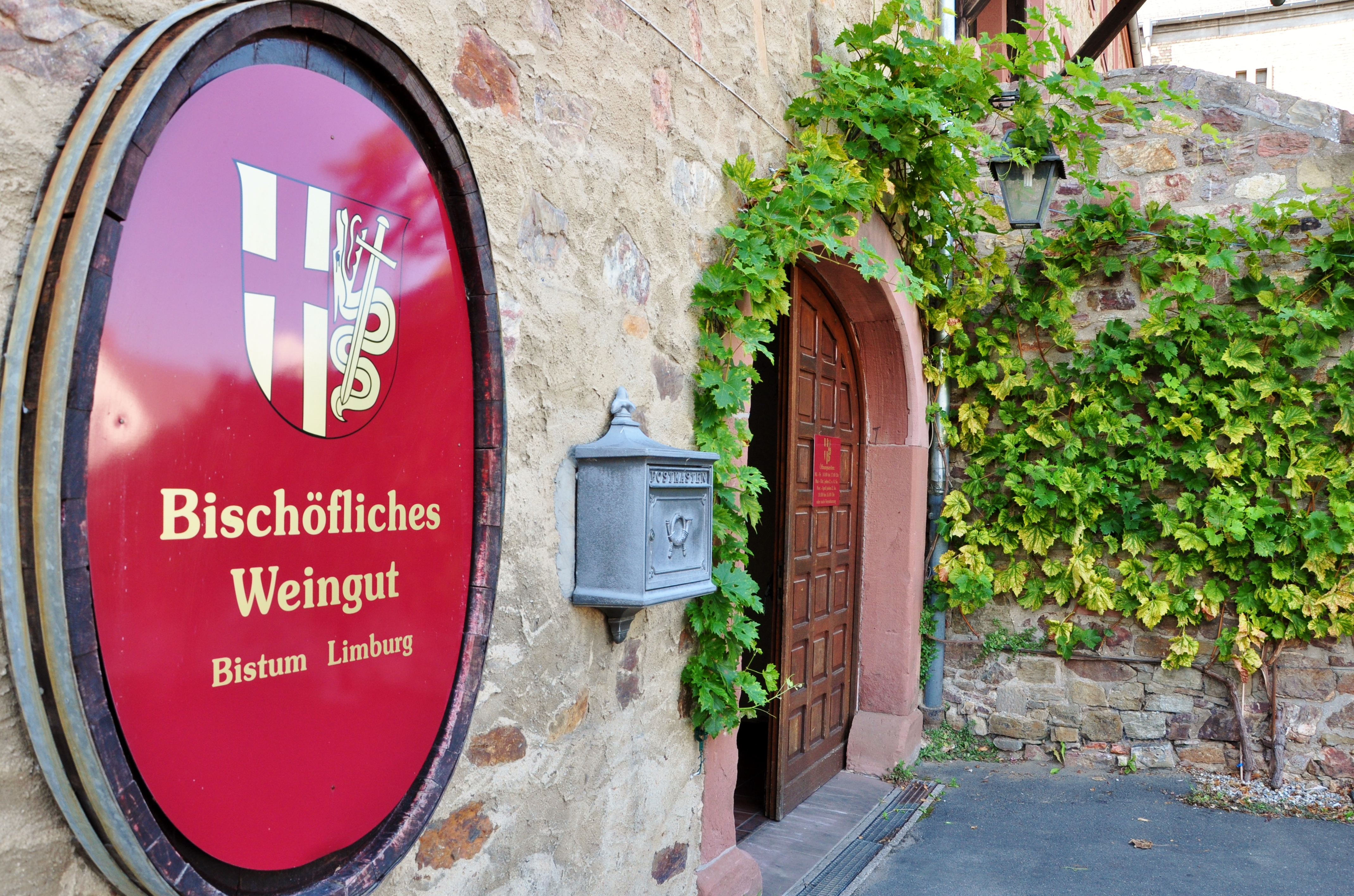 Ansicht des Einganges zum Bischöflichen Weinguts Rüdesheim